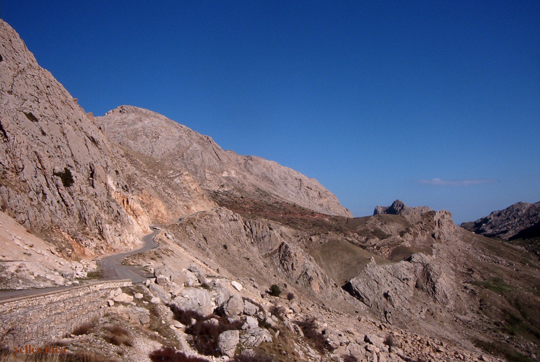 Massif de l'Akouker dans le Djurdjura